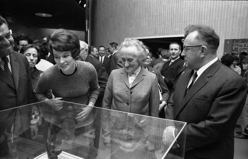 Berlin, Filmpremiere "...Rote Kapelle" Zentralbild/Spremberg 25.3.71 Berlin: Zu den Premierengästen des neuen 70-mm-Farbfilms der DEFA "KLK an PTX-Die Rote Kapelle", im Berliner Filmtheater "Kosmos" gehörte auch Greta Kuckhoff (M), Vizepräsidentin des Friedensrates der DDR und ehemalige antifaschistische Widerstandskämpferin in der Gruppe Schulze-Beysen/Harnack. Zusammen mit Generaloberst Erich Mielke (r), Minister für Staatsssicherheit, besichtigt sie die in einer kleinen Ausstellung im Foyer des "Kosmos" gezeigten persönlichen Gegenstände der Widerstandskämpfer. Abgebildete Personen: Mielke, Erich: Minister für Staatssicherheit, Armeegeneral, Politbüro des Zentralkomitees (ZK) der SED, DDR (GND 118977490) Kuckhoff, Greta: Vizepräsidentin des Friedensrates, Mitglied Weltfriedensrat, DDR